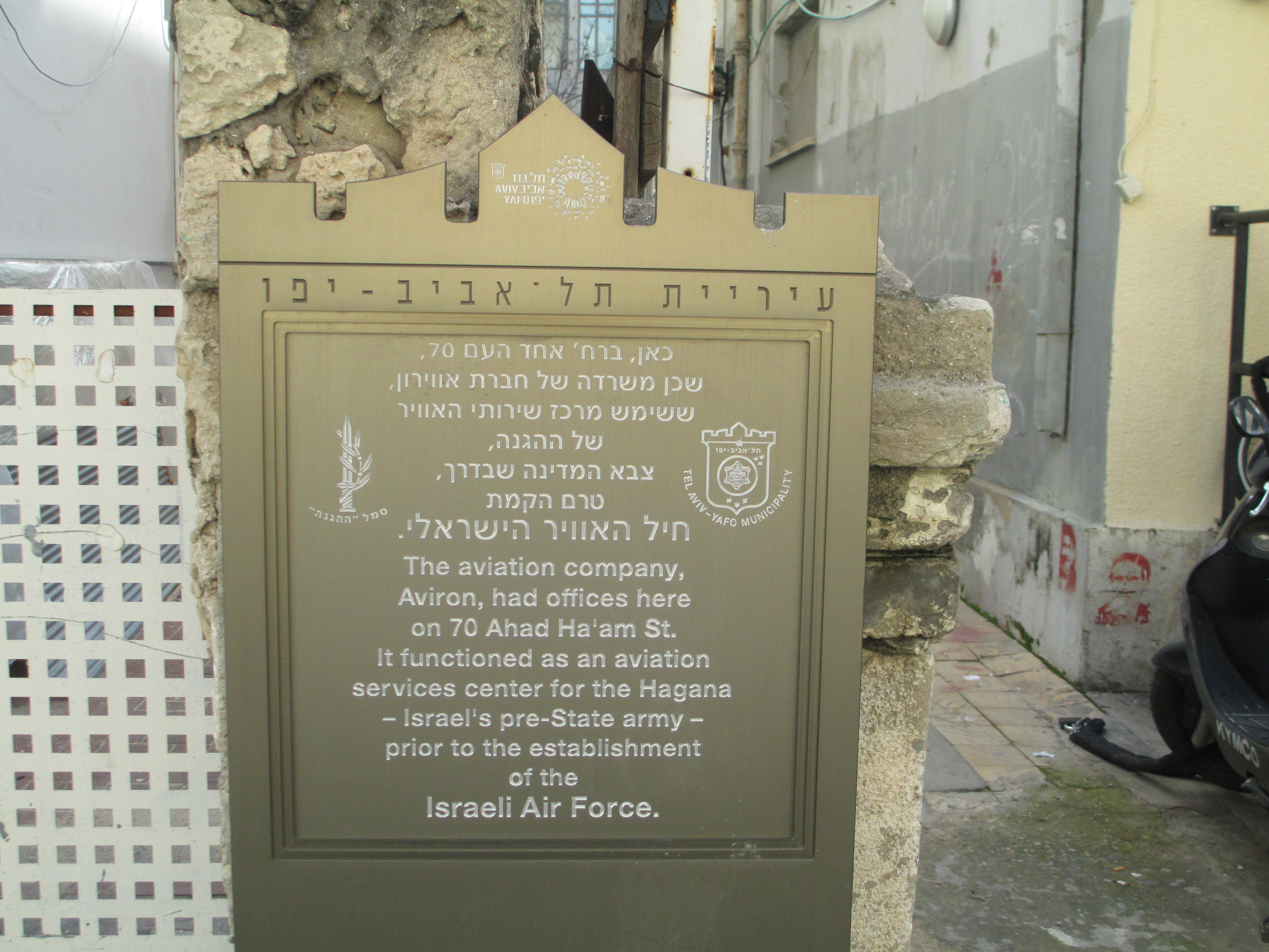 לוחית זיכרון בכניסה לבית בו היו משרדי חברת אווירון ברחוב אחד העם 70 בתל אביב